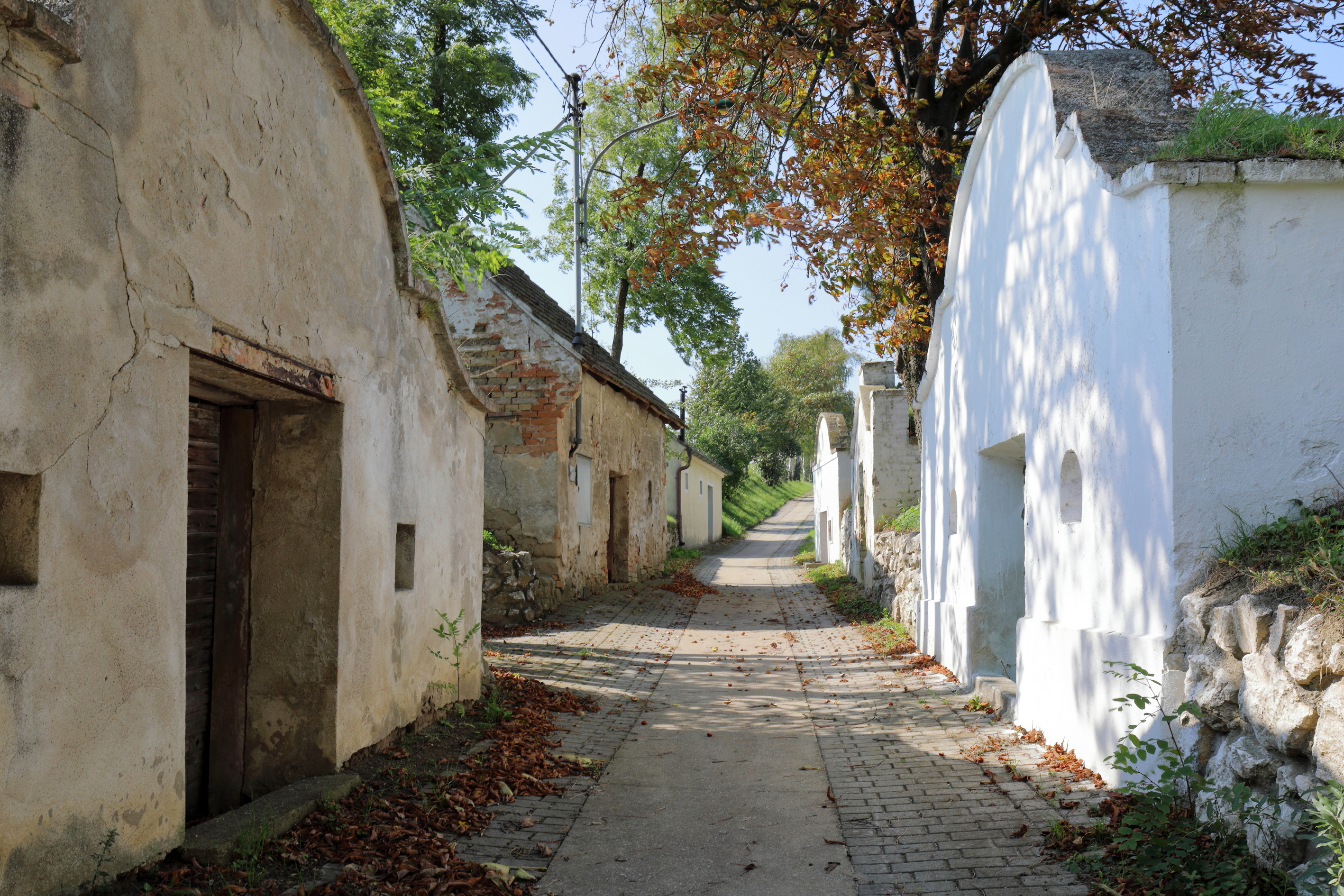 Die Kellergasse „Pottenhofener Straße“ in der niederösterreichischen Gemeinde Ottenthal. Eine rund 100 Meter lange Kellergasse in Grabenlage mit beidseitigen Gebäuden.